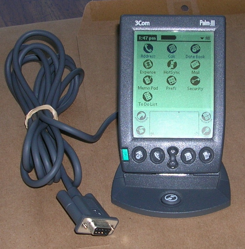 Palm III en su cuna